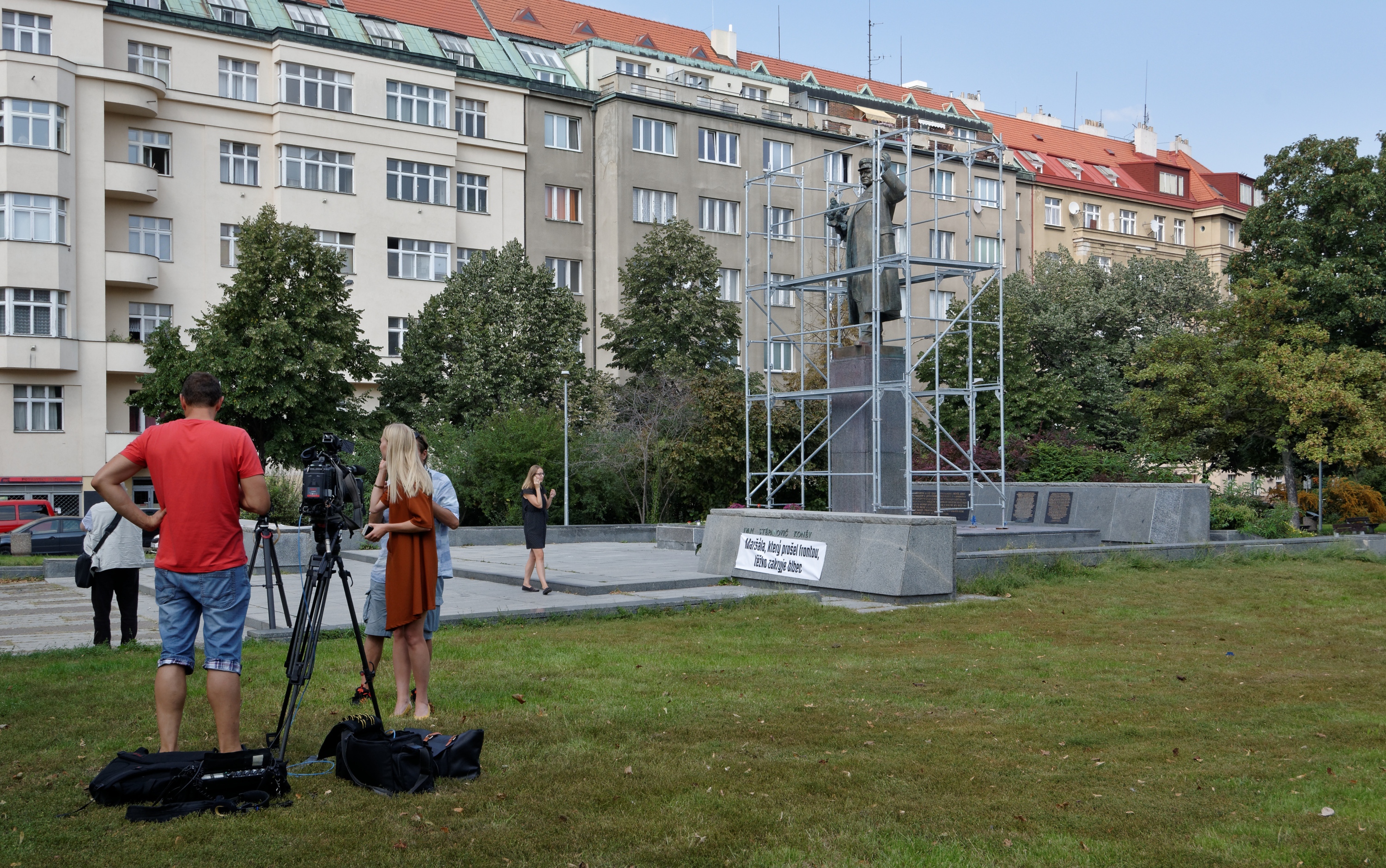 Pomník maršála Ivana Stěpanoviče Koněva na náměstí Interbrigády v Praze-Bubenči. Pomník nechala dne 30. srpna 2019 radnice Prahy 6 zahalit plachtou. Plachta byla později střžena. Na snímku stav 31. srpna 2019 v 15 hodin. Televizní štáby čekají na další incident.